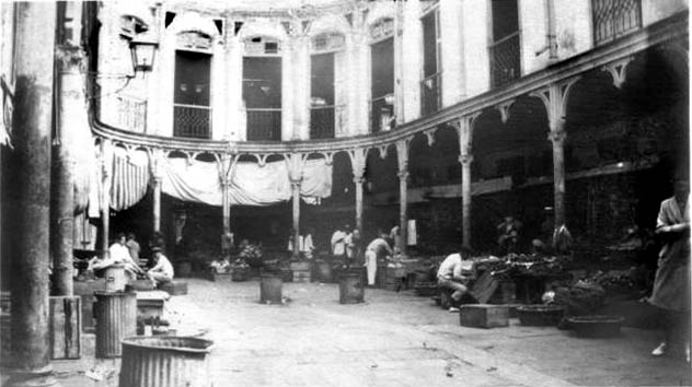 Antigo Mercado Colón, em Havana, Cuba (hoje demolido) em 1928. Autor desconhecido.